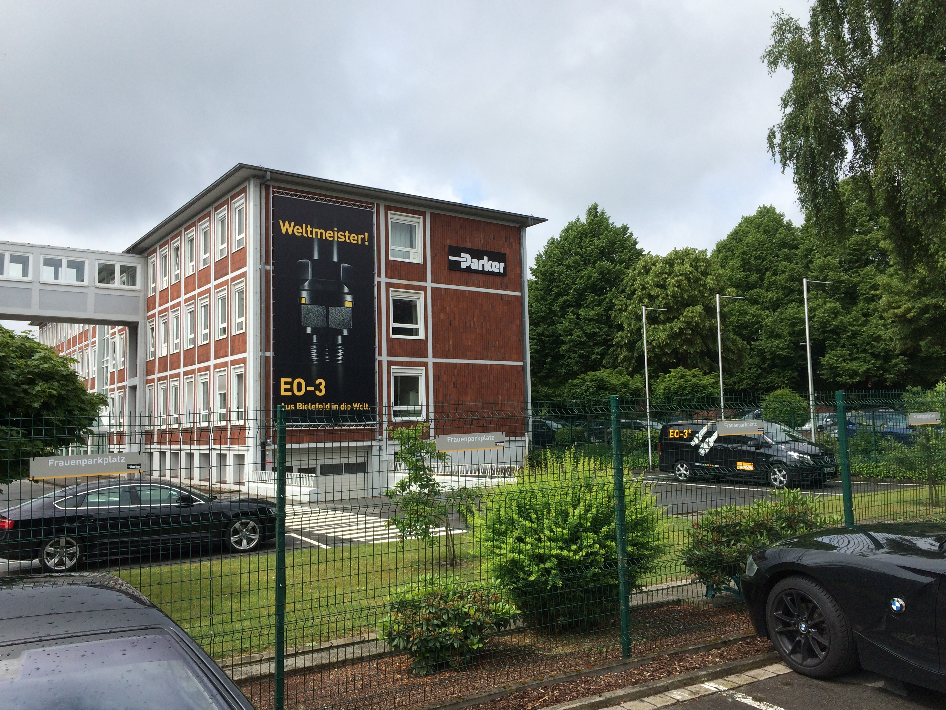 Hauptgebäude der Parker Hannifin Tube Fittings Division Europe am Standort Bielefeld, NRW, Deutschland.